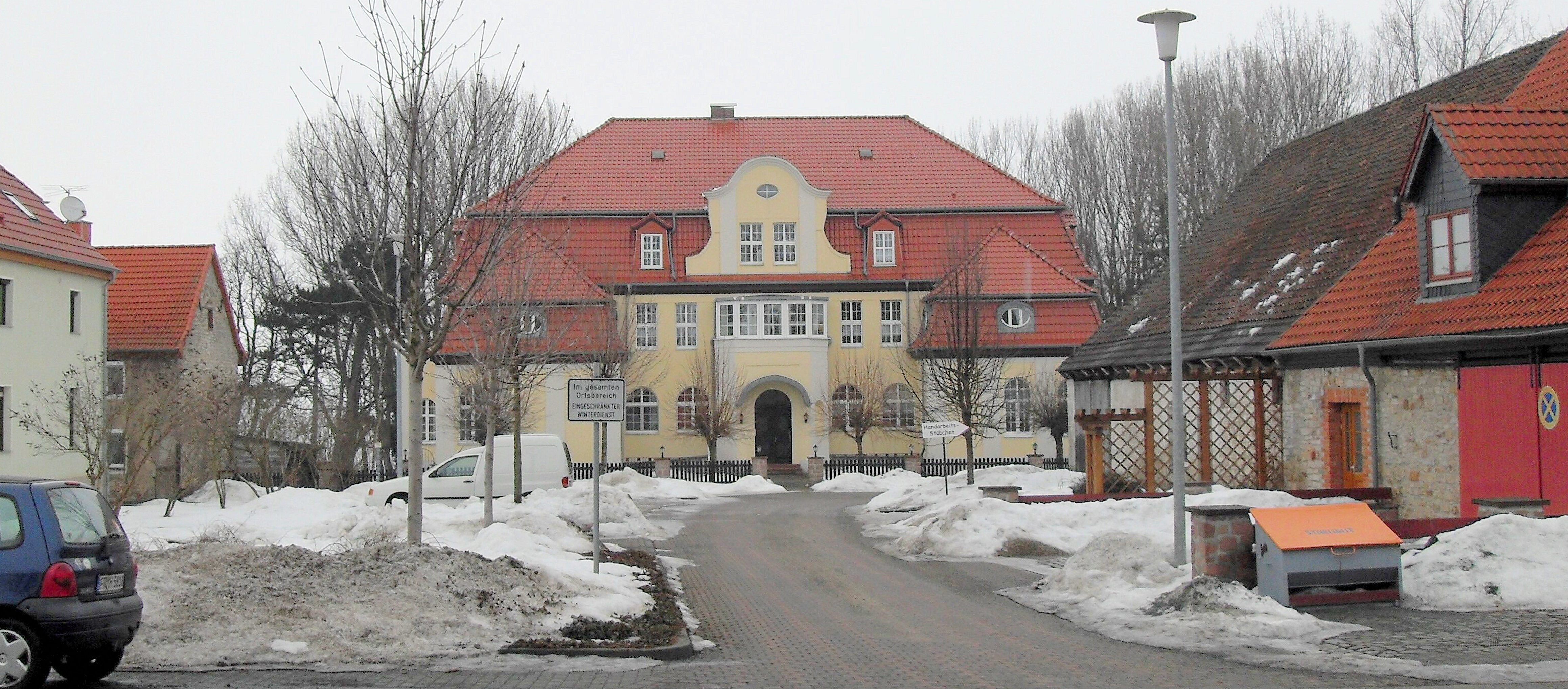 ehemaliges Herrenhaus in Ovelgünne, Gemeinde Eilsleben, Landkreis Börde, Deutschland